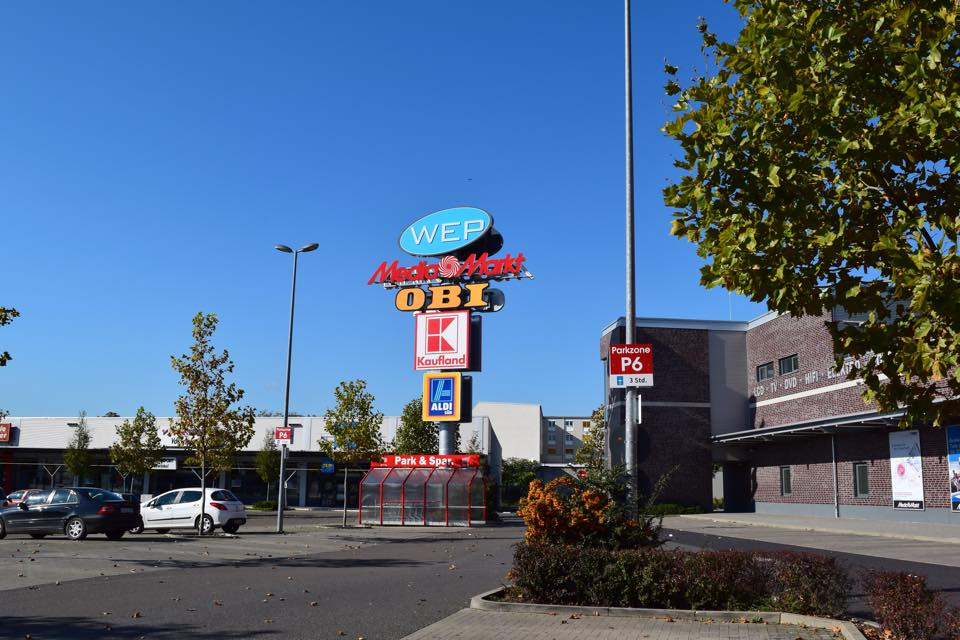 WEP (Wormser Einkaufspark)